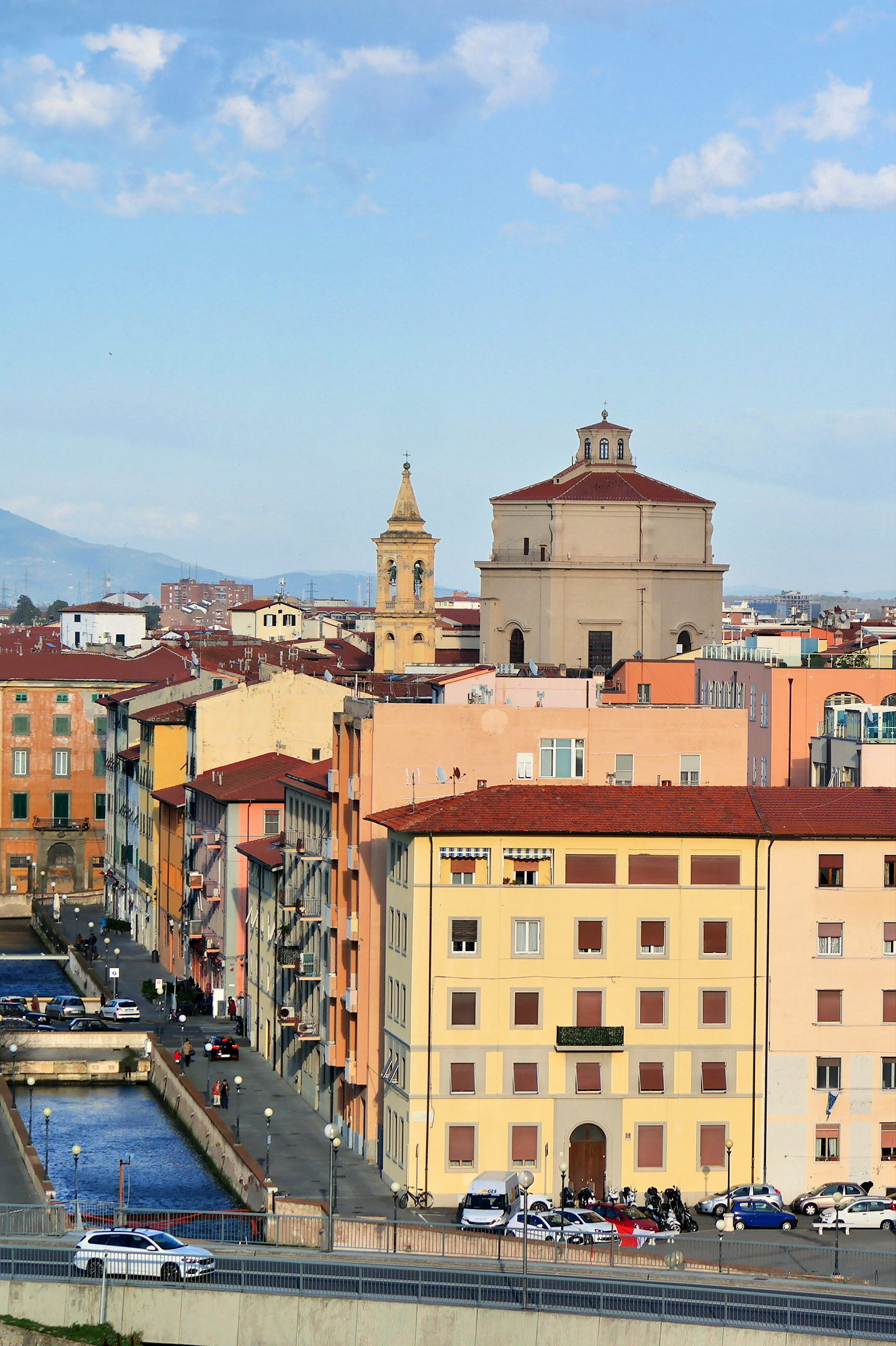 Veduta del quartiere Venezia (in cui svetta la slanciata struttura della chiesa di santa Caterina) vista dalla torre della fortezza Vecchia a Livorno